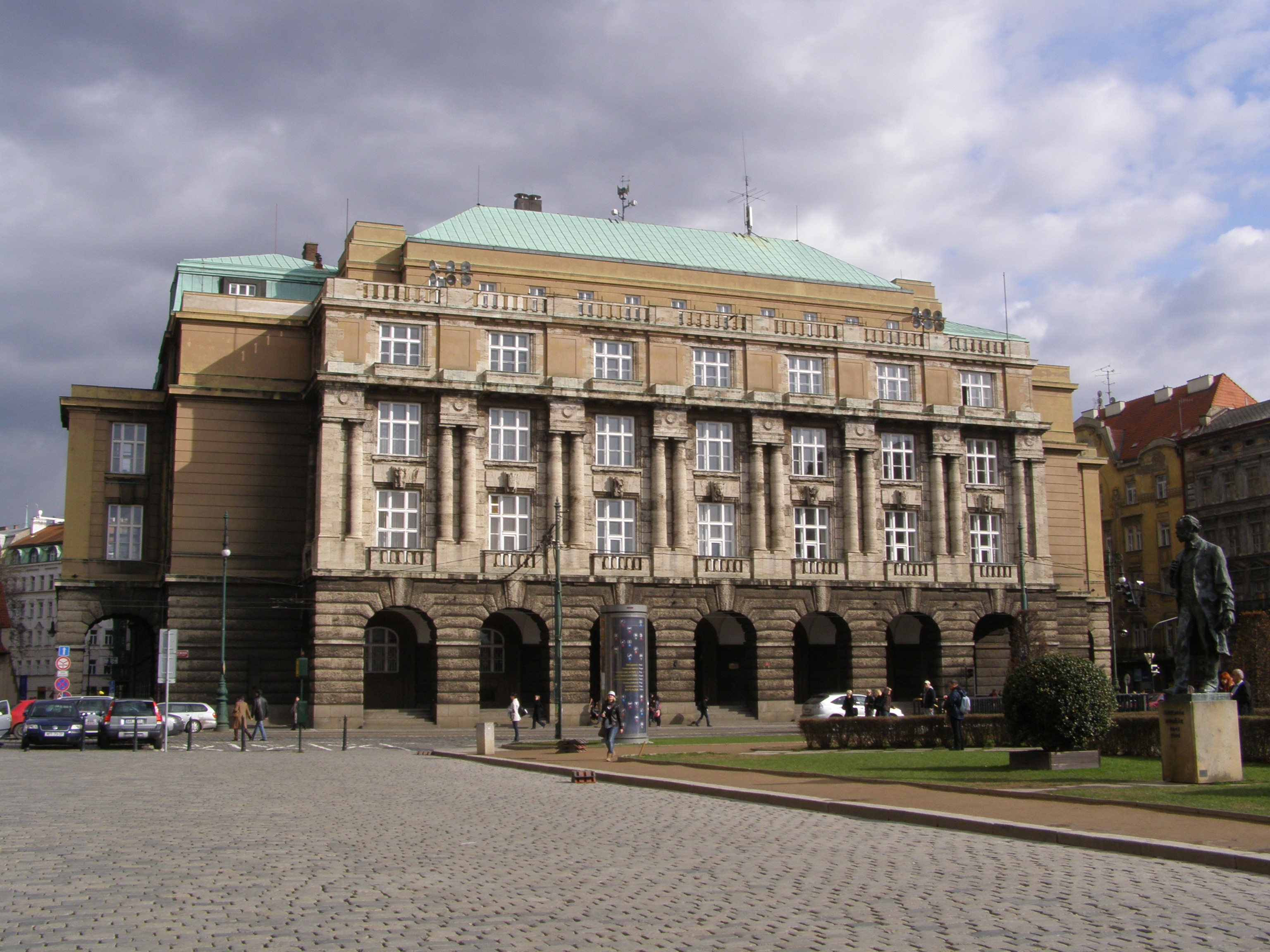 Praha, Staré Město, Náměstí Jana Palacha, hlavní budova Filozofické fakulty Univerzity Karlovy